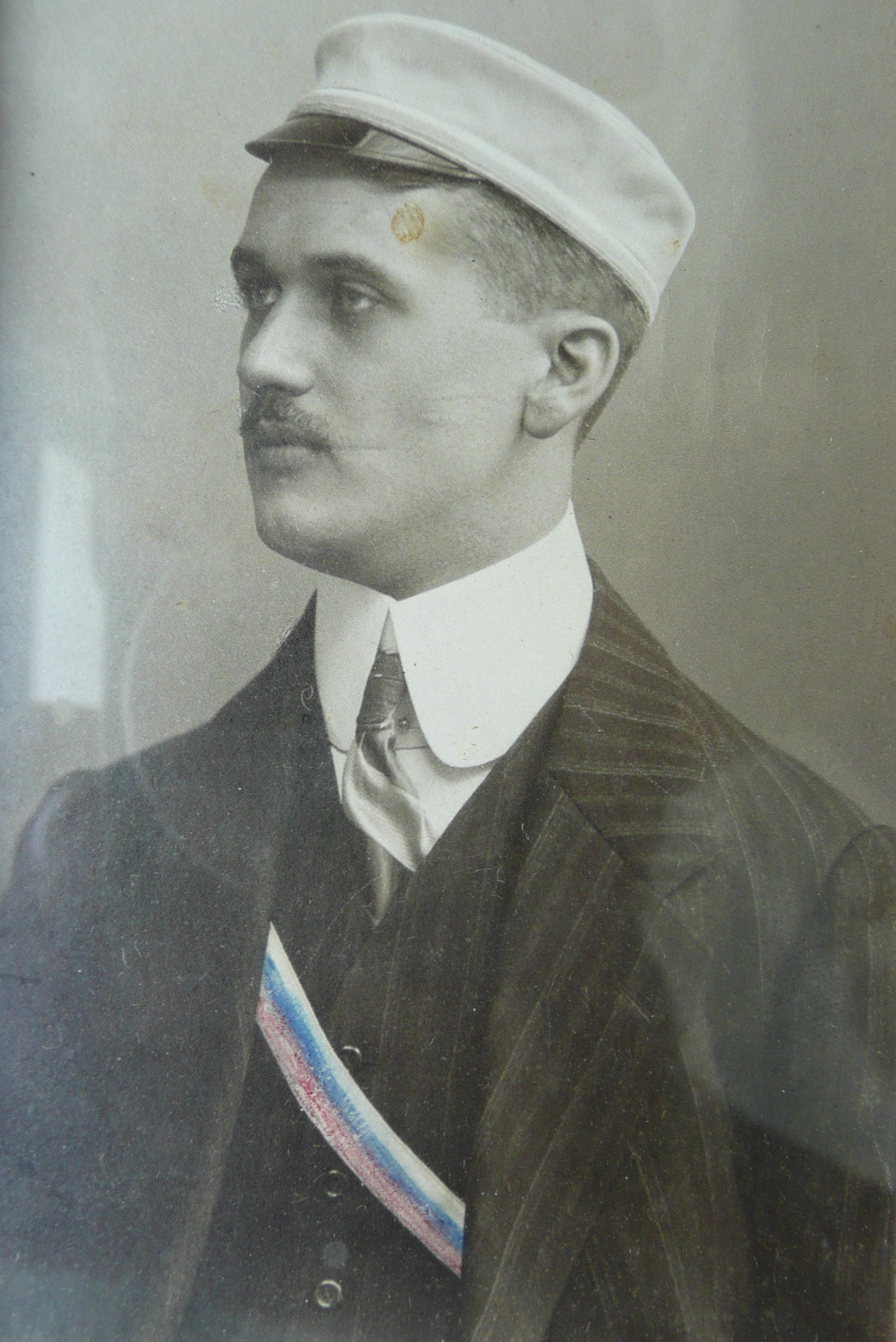 Caesar Rudolf Boettger (1888-1976) als Student des Corps Silesia in Breslau